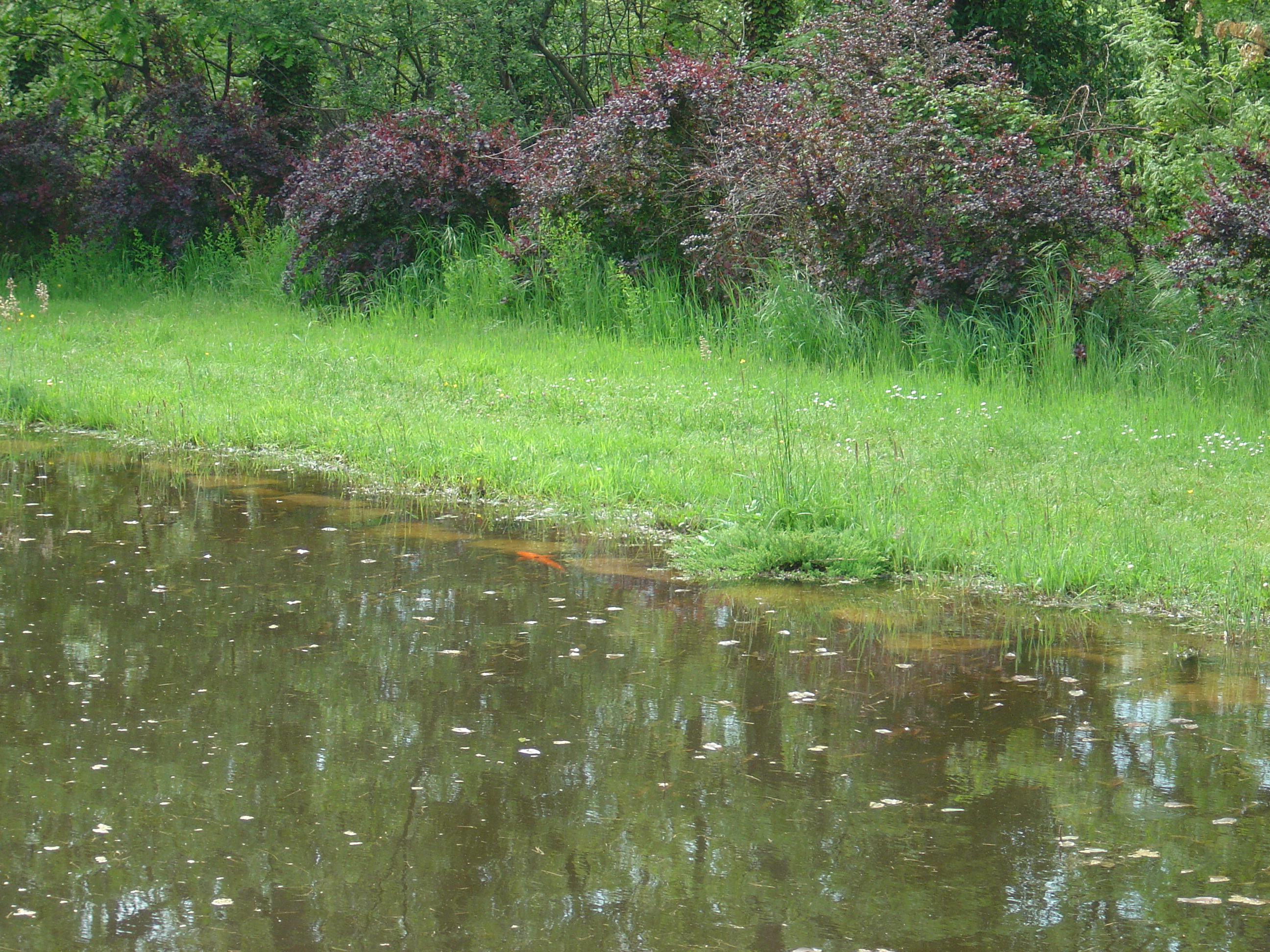 Koi en la charca de Machicullano